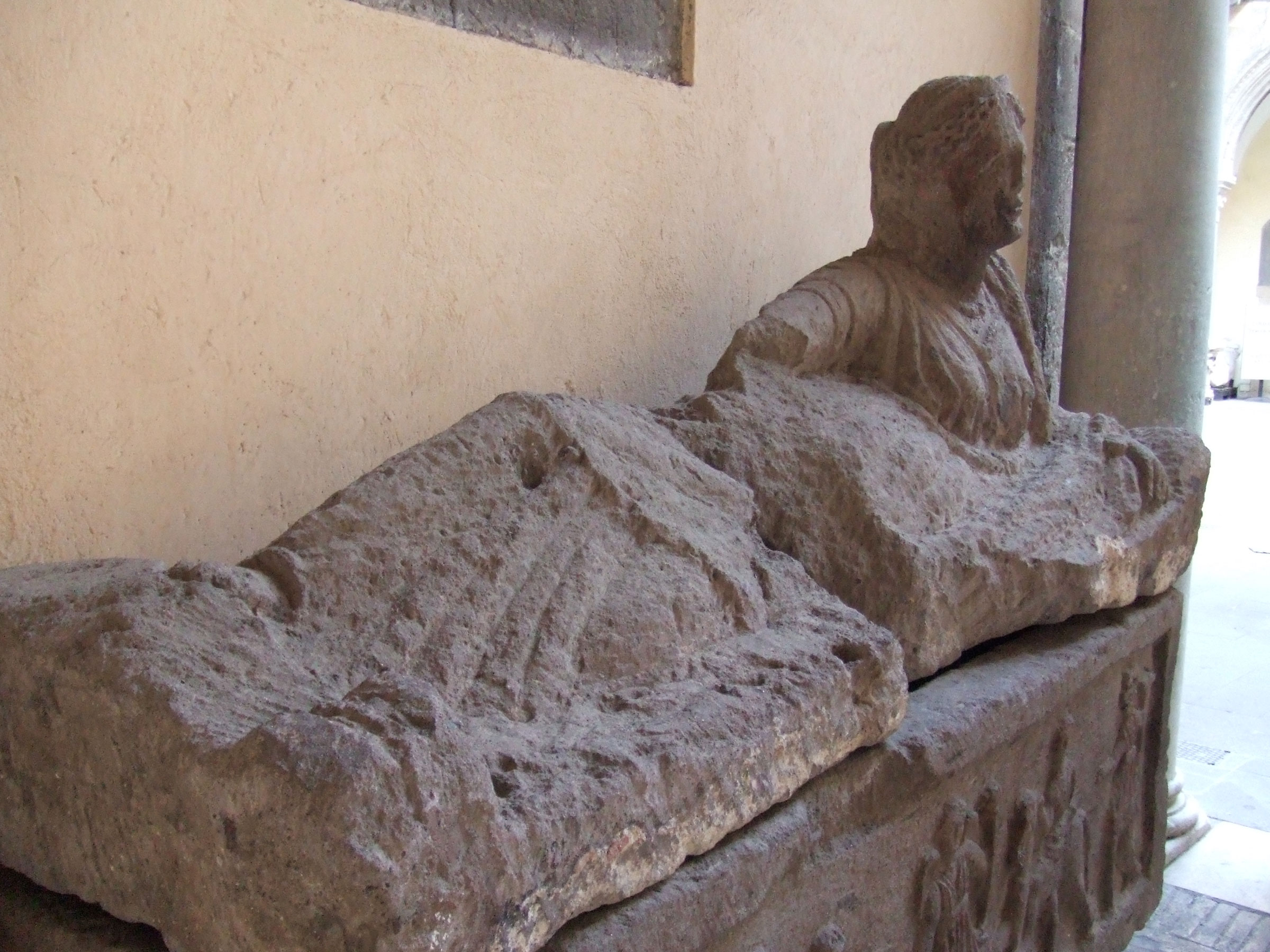 Sarcophage en pierre (nenfro) exposé dans l'entrée du palazzo Vitelleschi (musée archéologique national de Tarquinia)